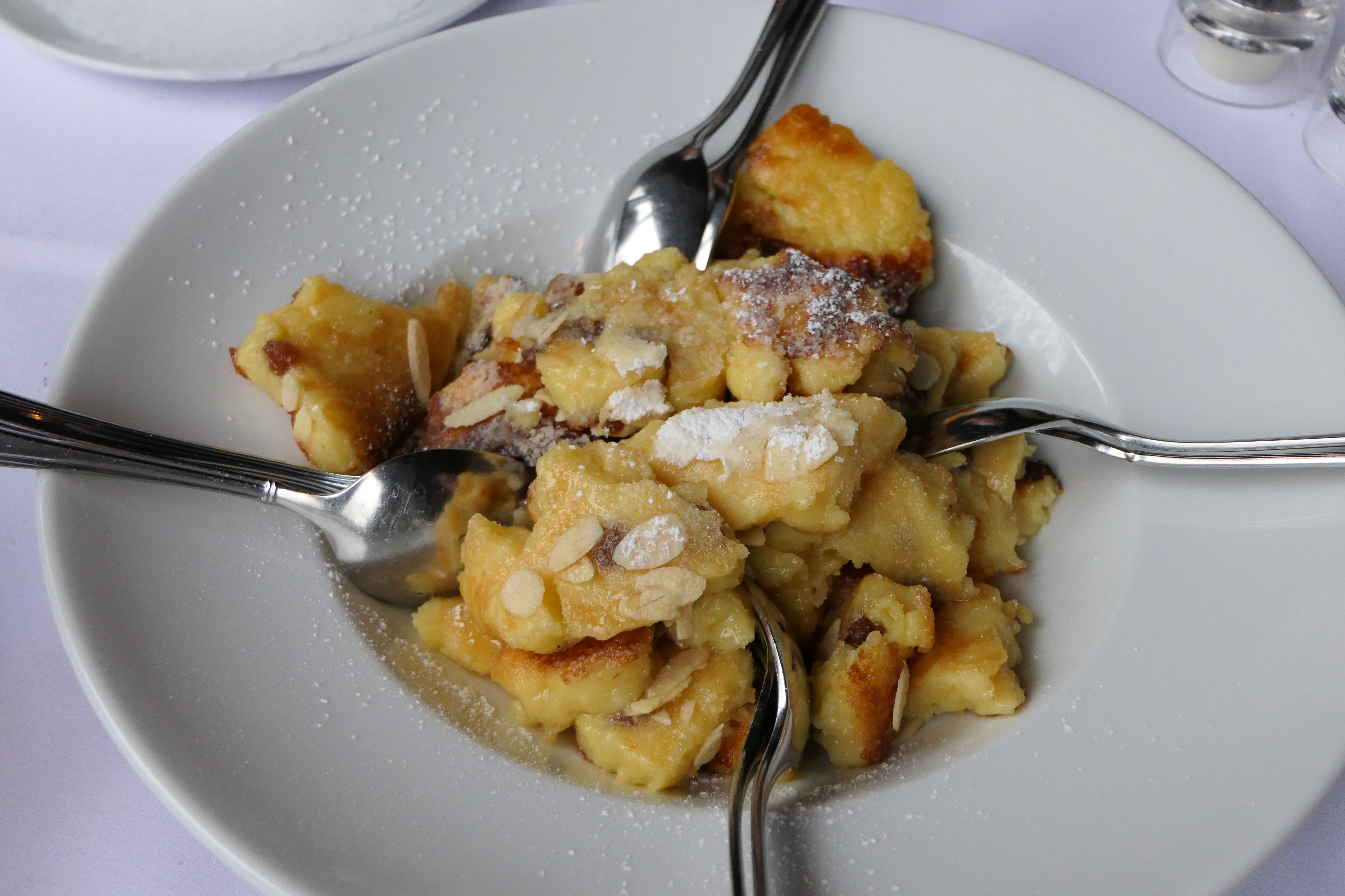 Kaiserschmarrn mit Mandelsplittern und Apfelmus zu viert in Wachwitz, Elbterrasse Wachwitz, Dresden